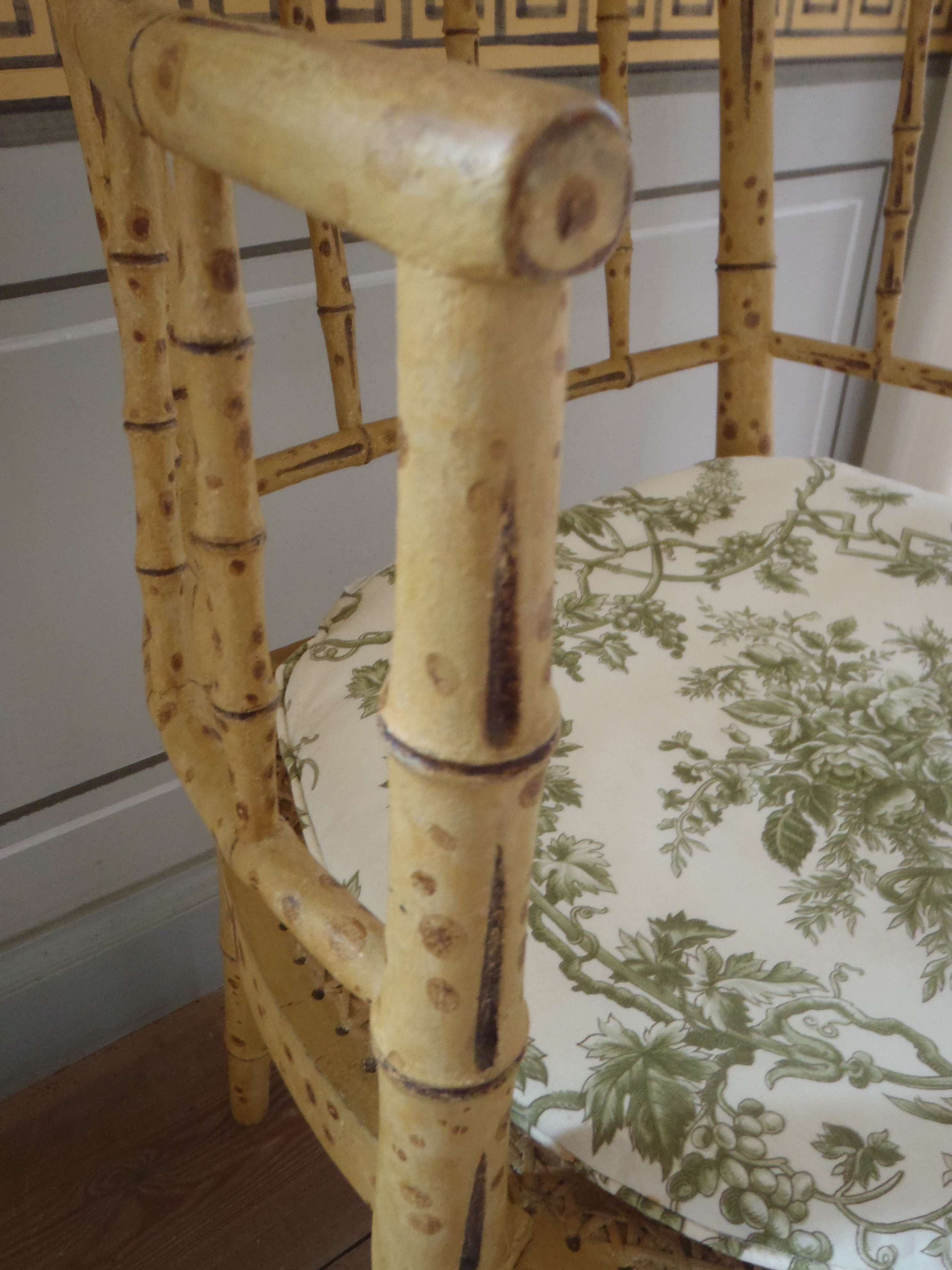 Stol på Bredemuseet af træ uformet til at ligne bambus.